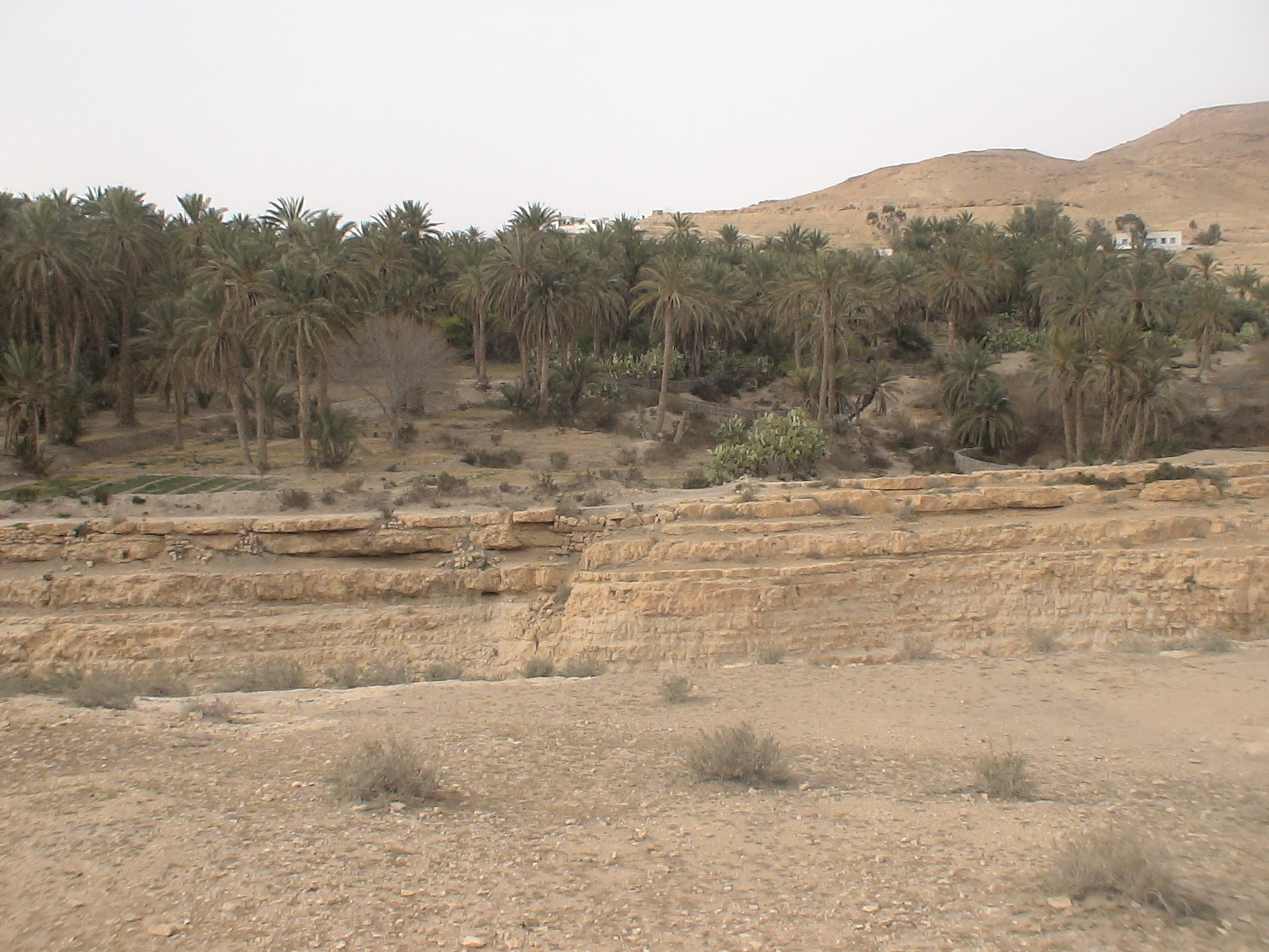 Oasis de Midès